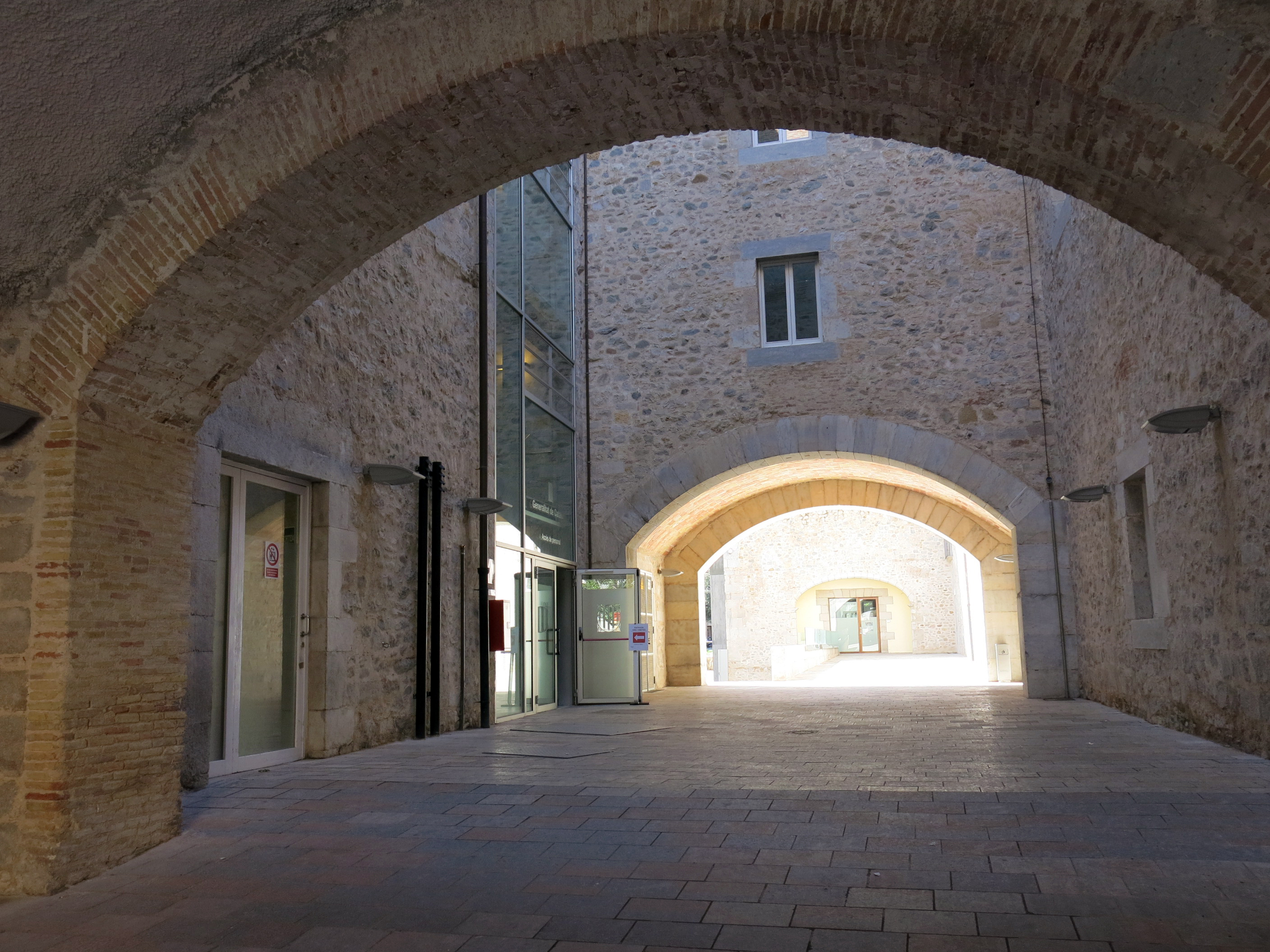 Hospital Provincial de Santa Caterina (Girona)